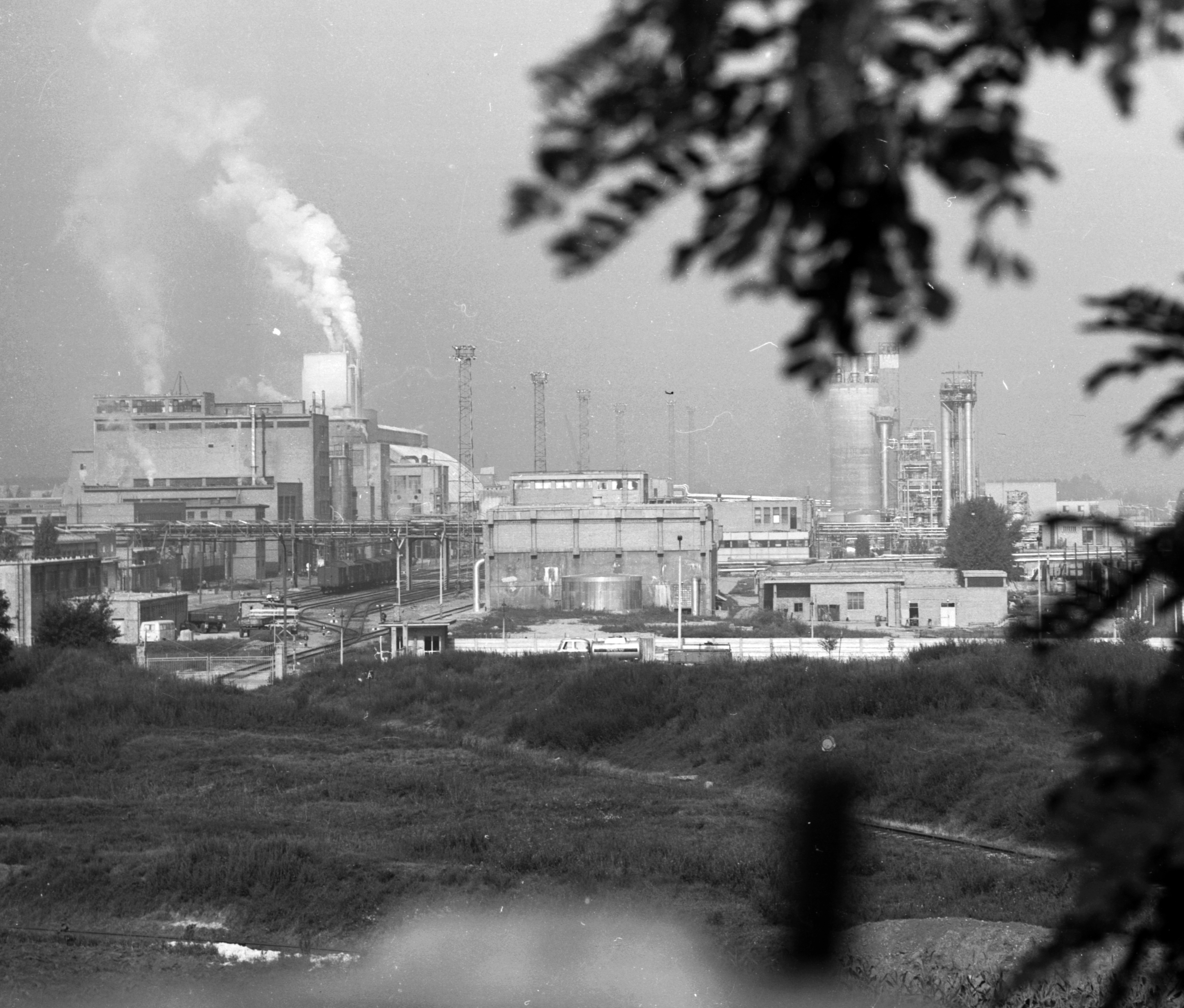 Borsodi Vegyi Kombinát (ma BorsodChem). Location: Hungary Tags: factory, industry Title: Borsodi Vegyi Kombinát (ma BorsodChem).